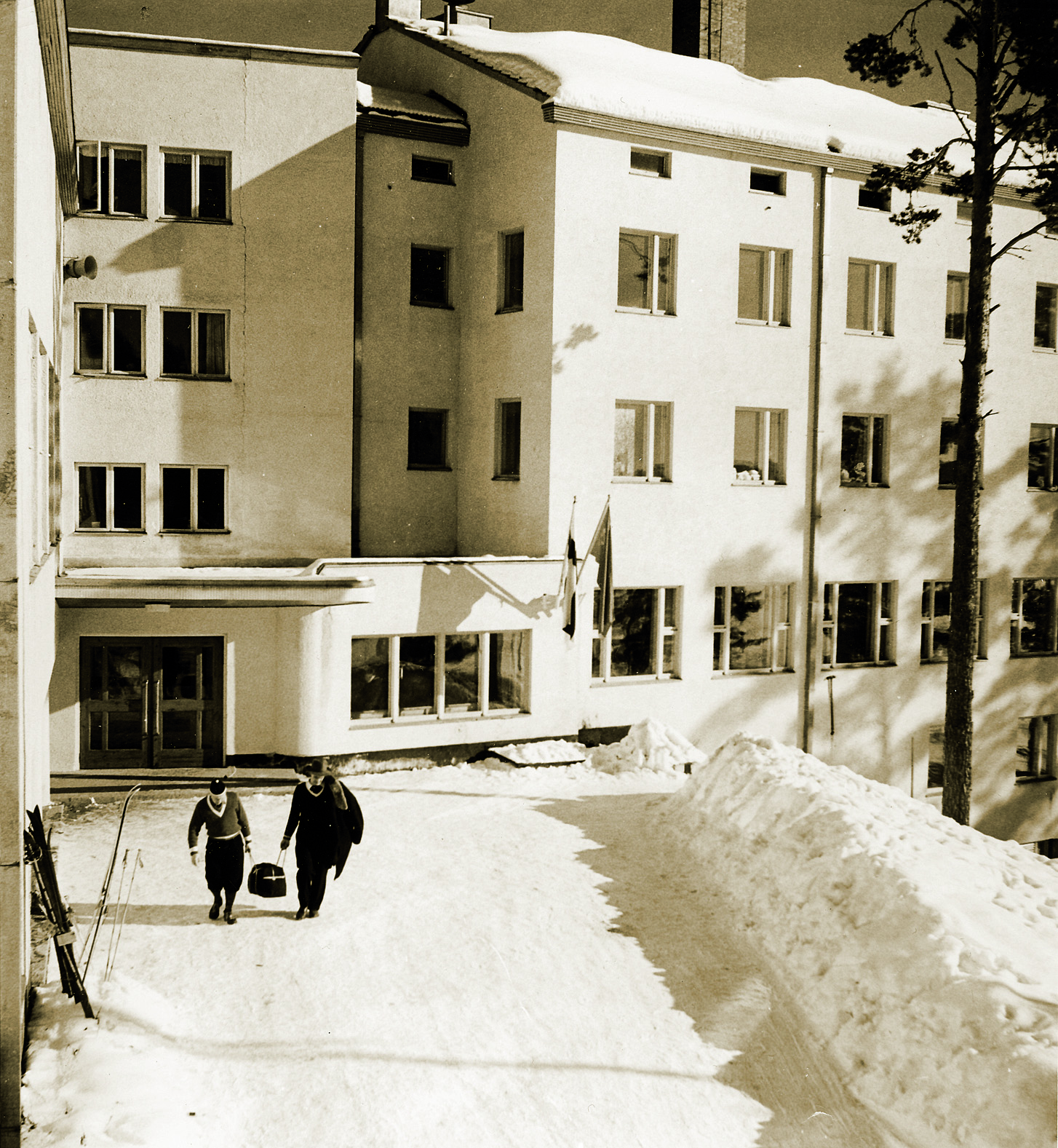 Uusi opistorakennus majoitus- ja haroitustiloineen mahdollisit Pajulahden toiminnan muuttamisen ympärivuotiseksi.